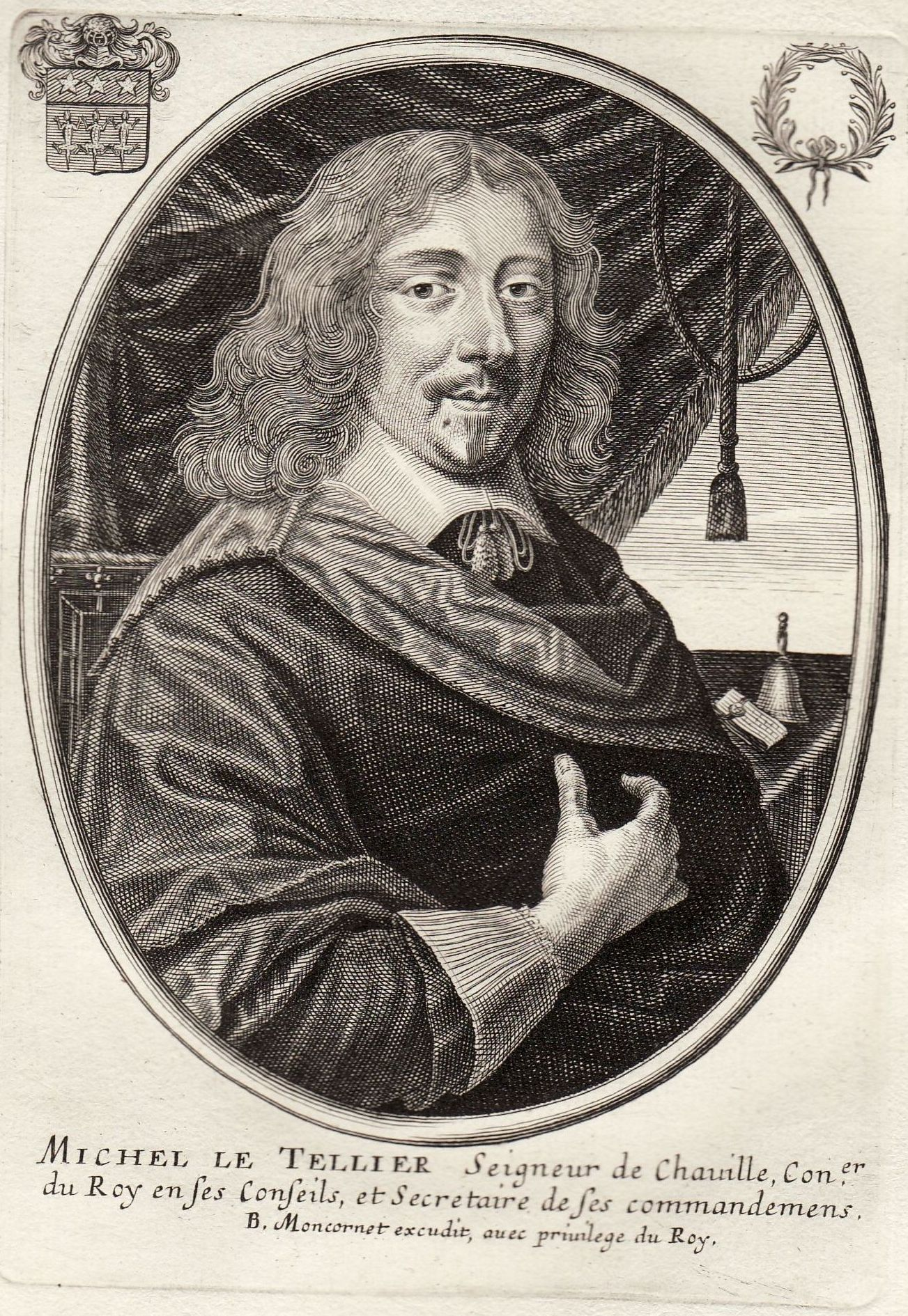 Michel Le Tellier, secrétaire d'Etat de la Guerre. Gravure de Balthazar Moncornet.